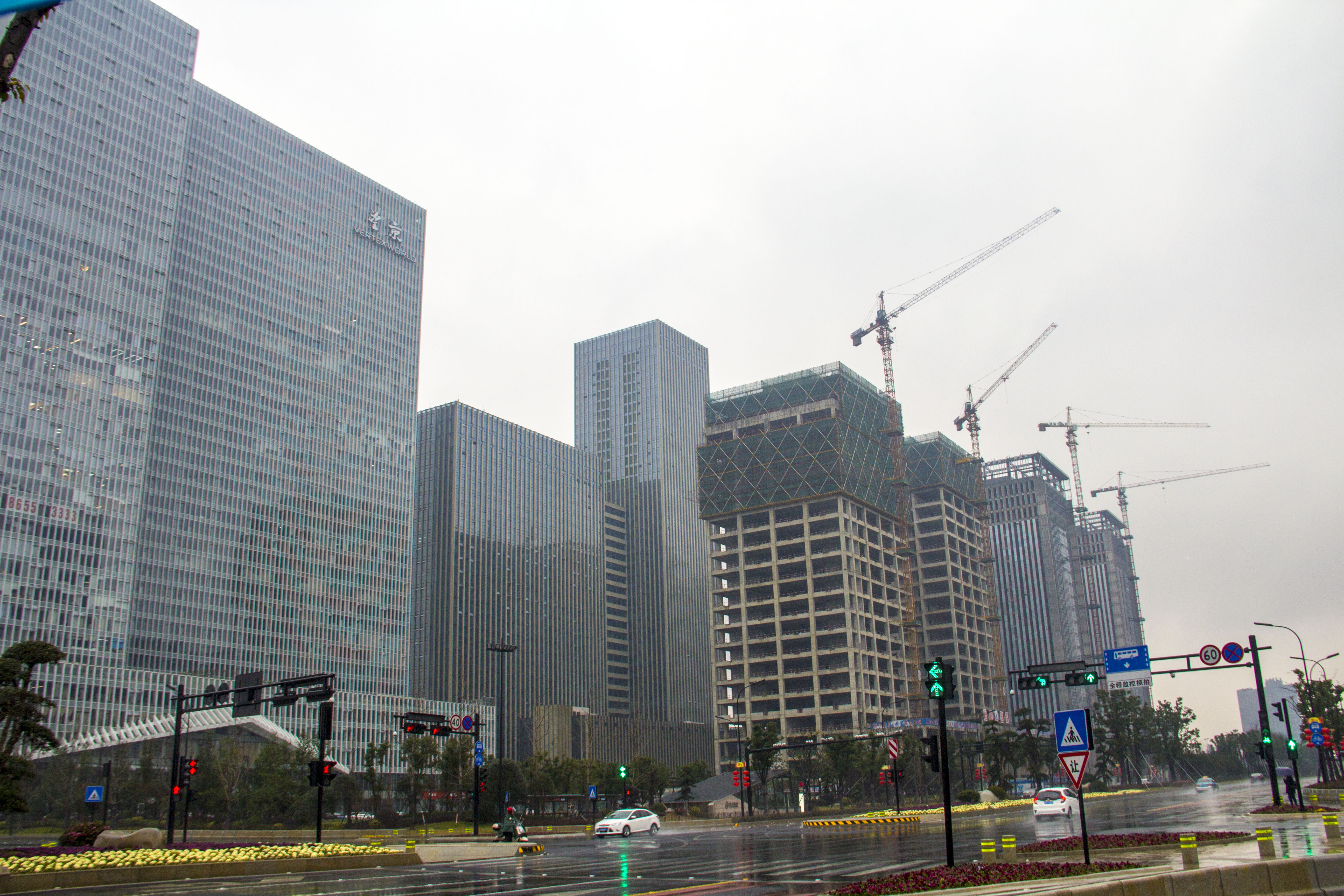 钱江世纪城，雨